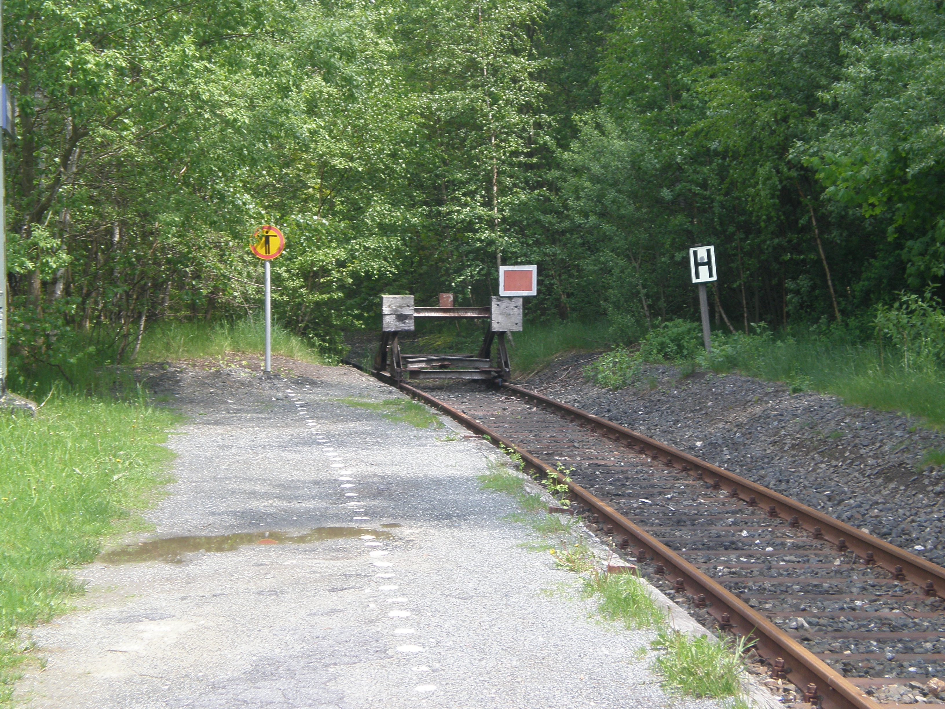 Prellbock an der ehemaligen Lokalbahn Helmbrechts-Selbitz